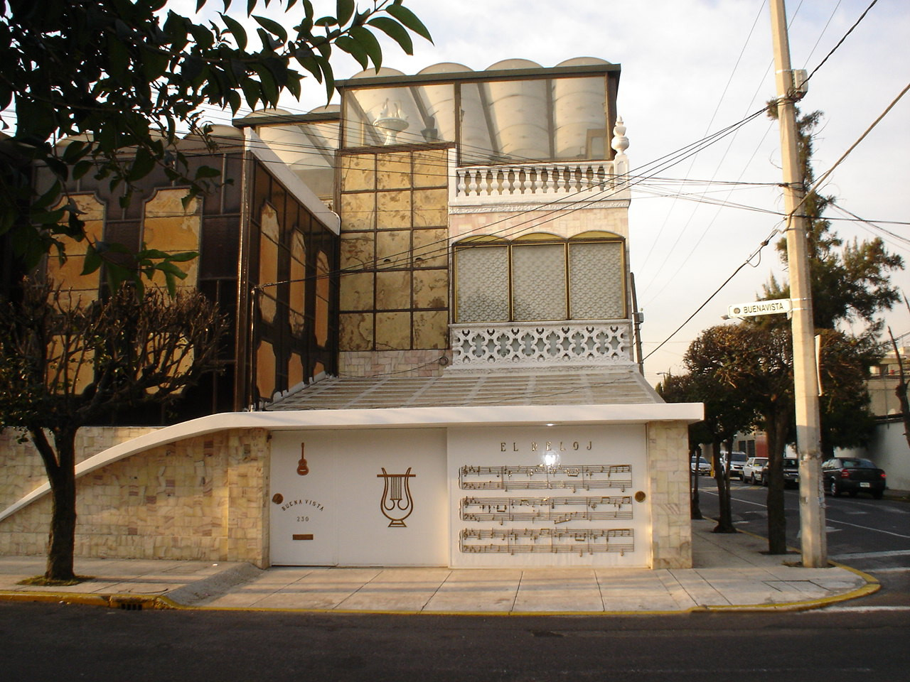 La Casa del Reloj en la colonia Lindavista de la Ciudad de México